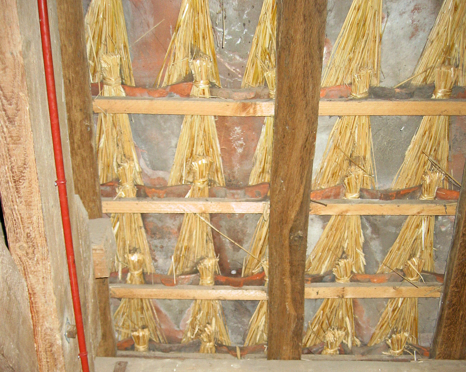 Collse Watermolen, dakpannen met strodokken, Eindhoven-Tongelre, the Netherlands